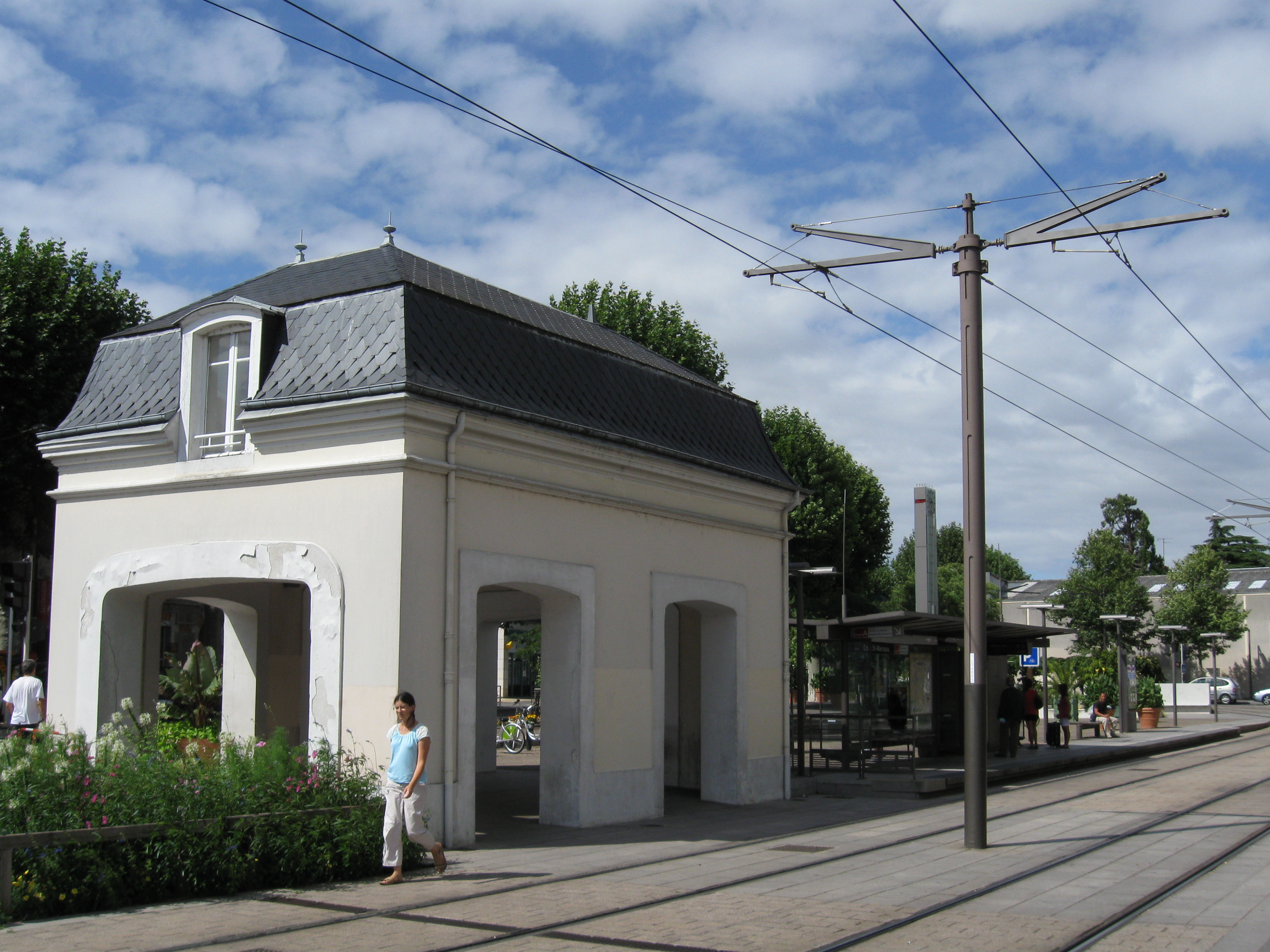 Ancien pavillon d'octroi et station Croix Saint-Marceau, Orléans, Loiret, France